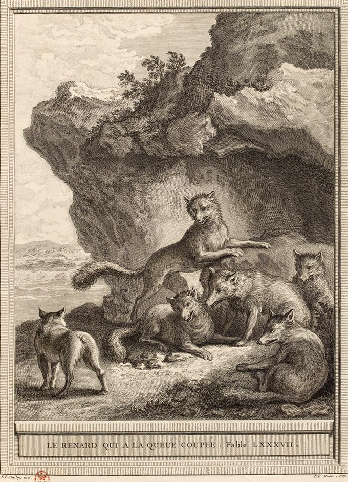 Gravure réalisée par Pierre Etienne Moitte d'après un dessin de Jean-Baptiste Oudry représentant la fable Le renard ayant la queue coupée de Jean de La Fontaine (fable 5 du livre V). Cette gravure est parue dans l'édition complète des fables de La Fontaine, parue en quatre tomes chez l'éditeur Desaint & Saillant, rue saint Jean de Beauvais à Paris, 1755-1759.